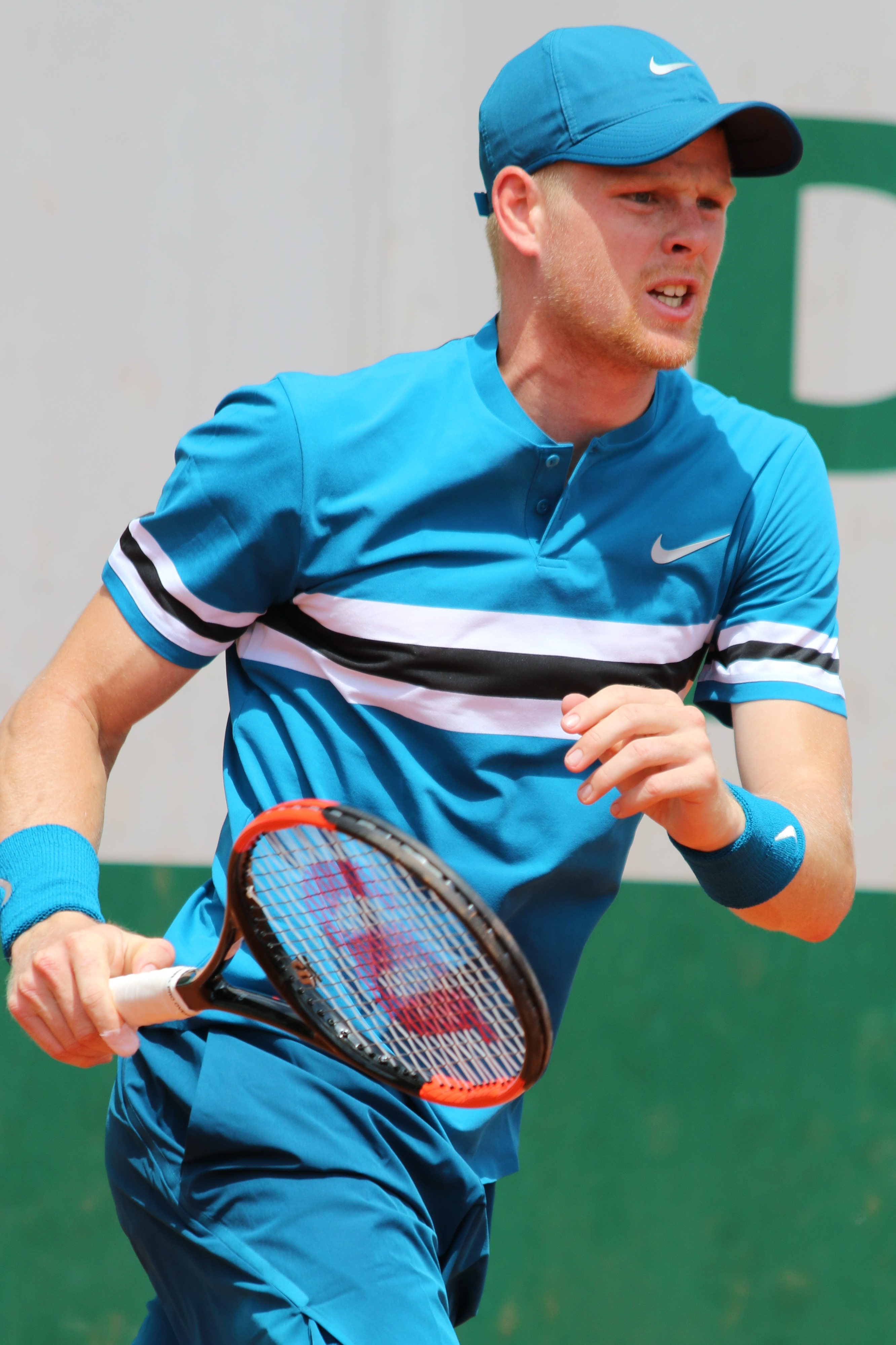 Edmund RG18 (12)